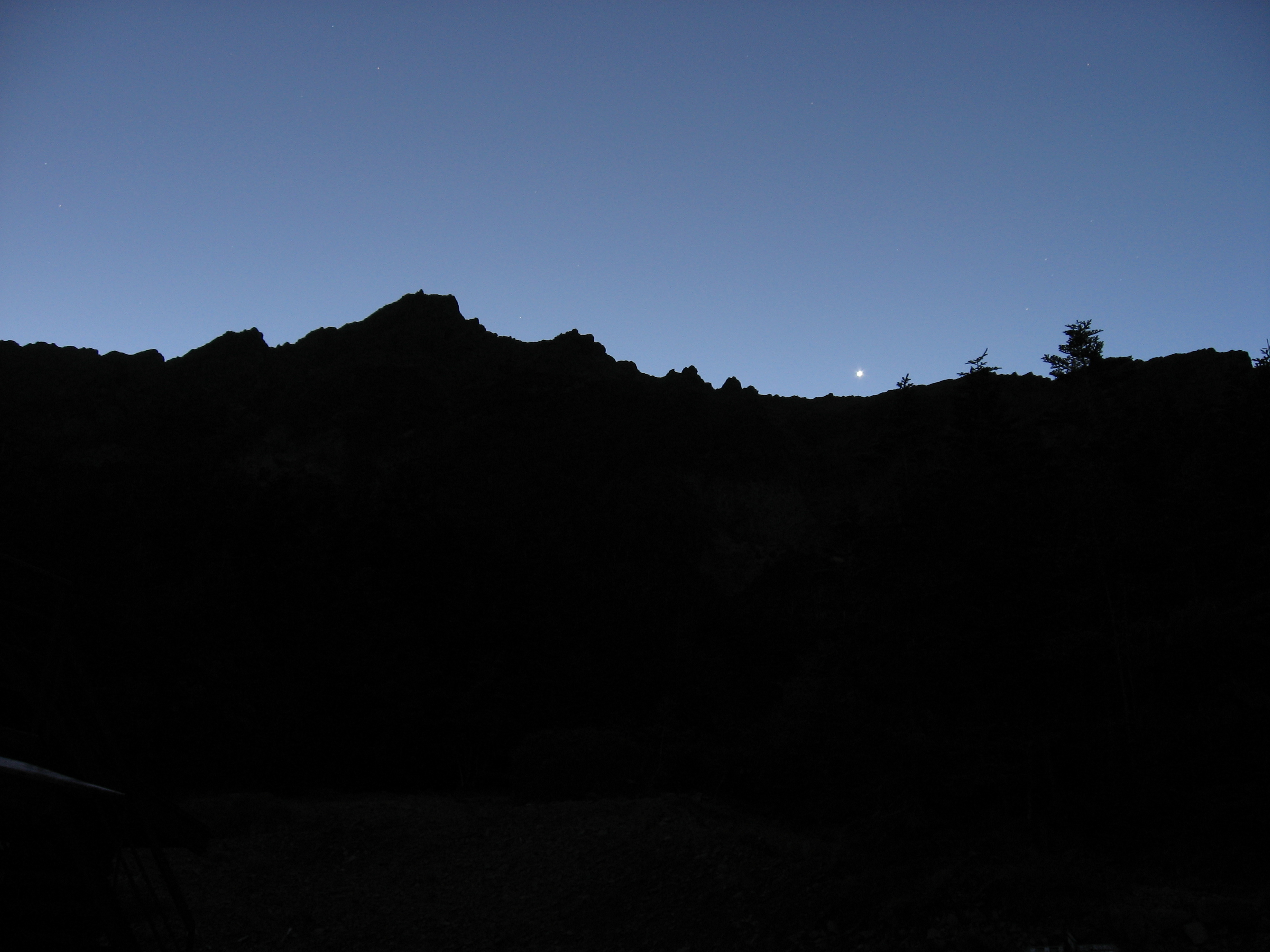 行者小屋横より望む横岳と明けの明星